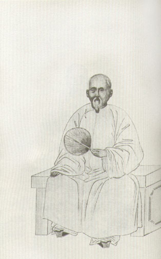 廖平，清朝學者。Liaoping